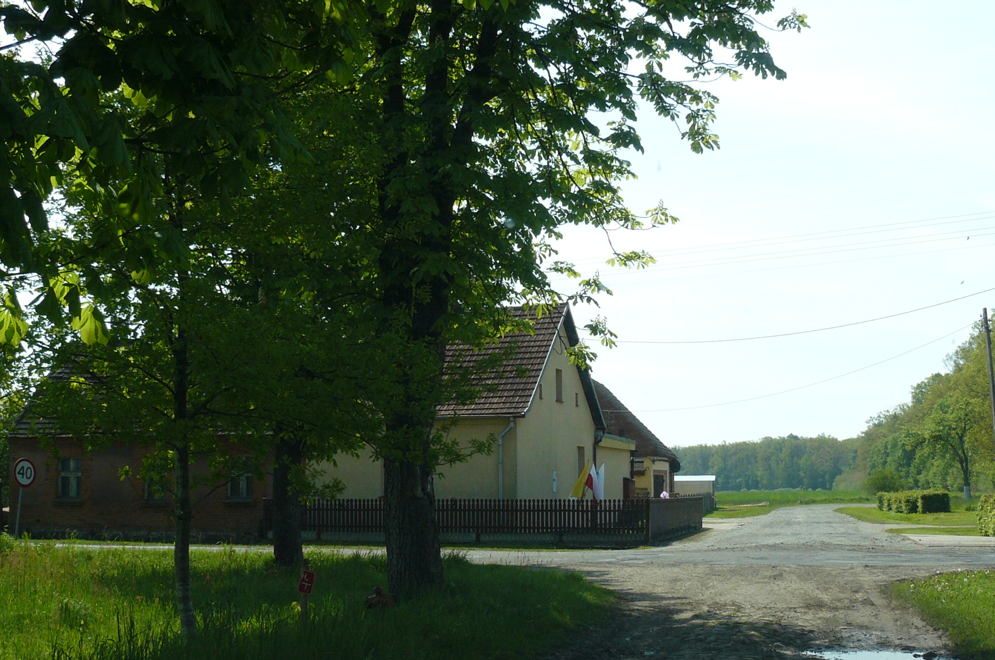 Chruszczyny, przysiółek Palczew.